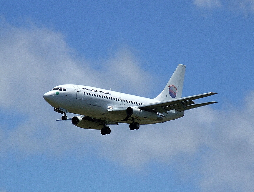 SA Express (Interlink) B737-230 ZS-SIP